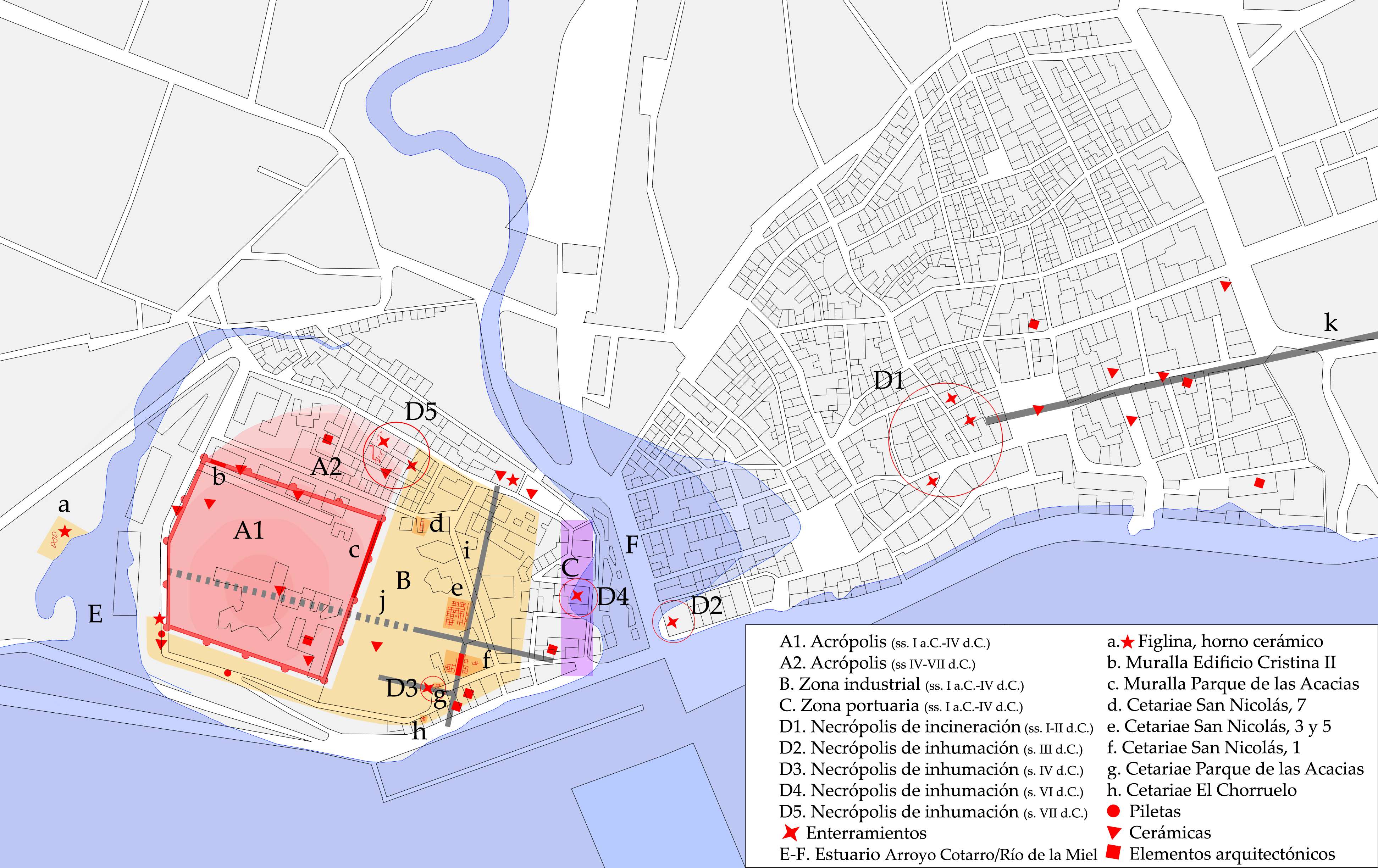 Plano de los principales yacimientos romanos de la ciudad de Algeciras indicando el área aproximada de la zona industrial y de la acrópolis según las últimas excavaciones realizadas en la localidad. Algeciras, Andalucía, España.